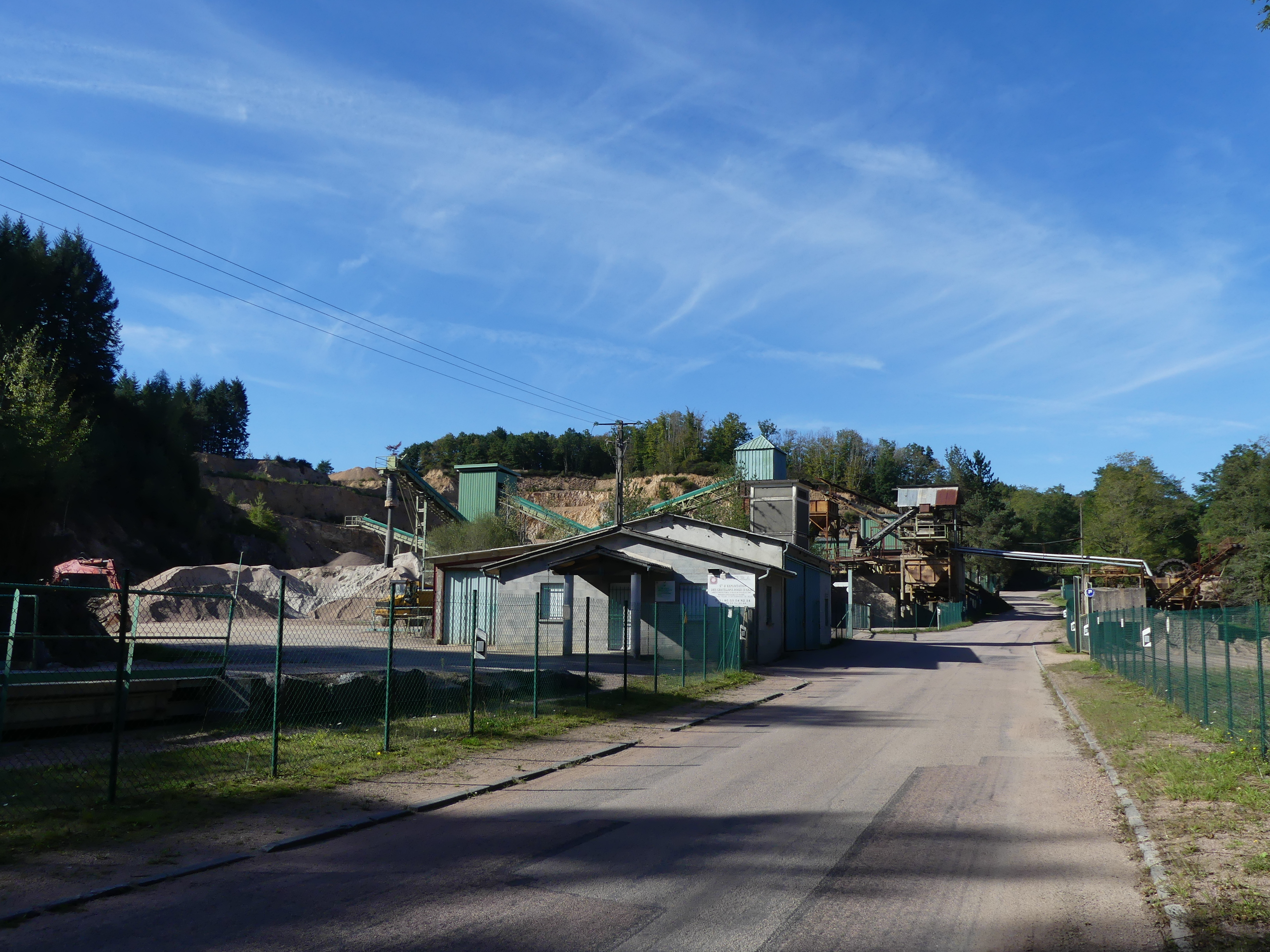 Installations de la carrière exploitée par la SEGRA à Abjat-sur-Bandiat, Dordogne, France.